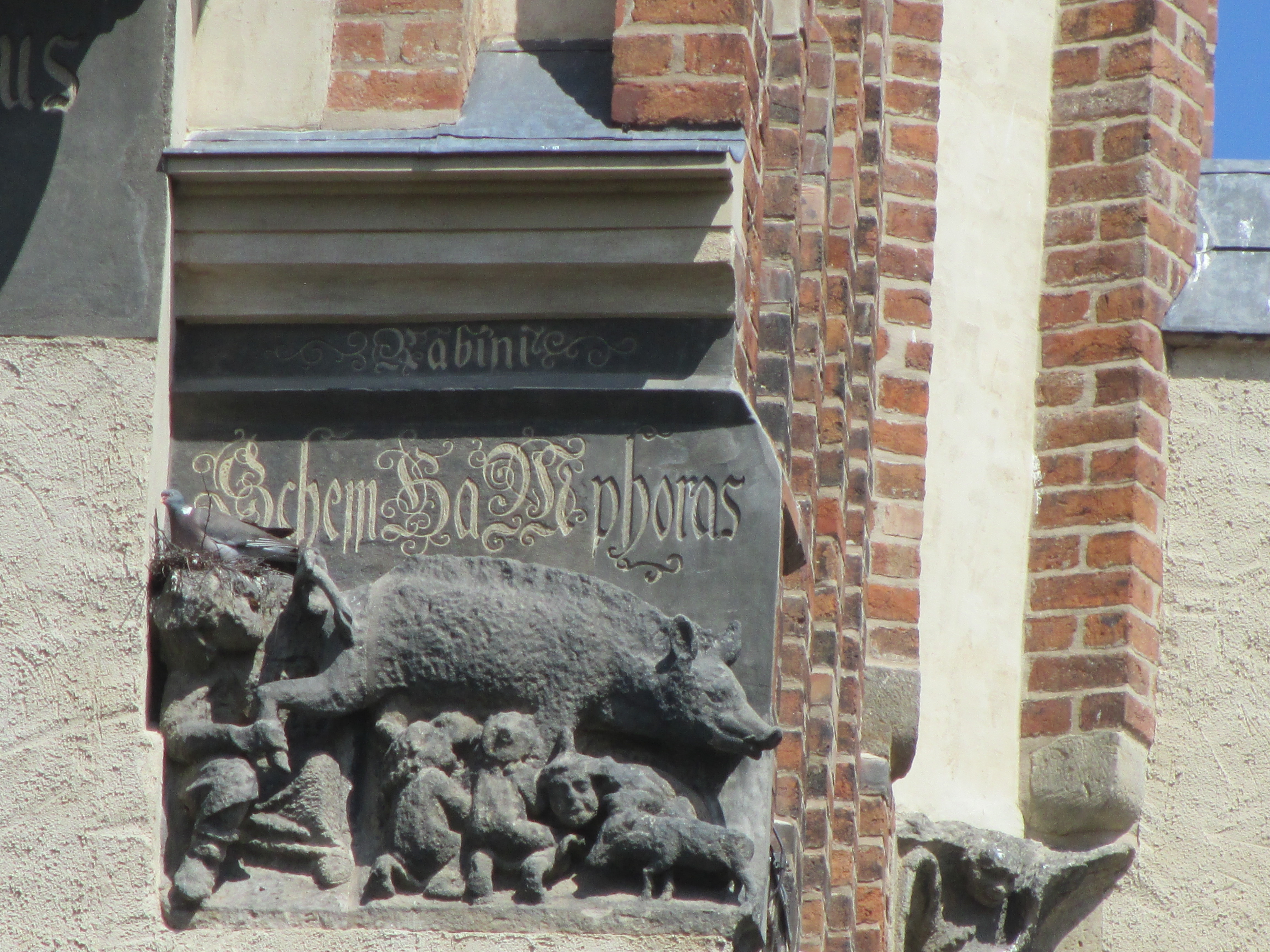 פסל חזירת היהודים בכנסייה העירונית בוויטנברג-לותרשטאט